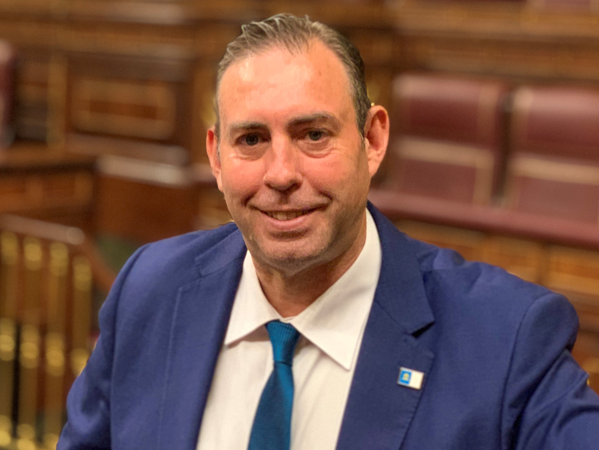 Jose Antonio Rodriguez Salas como diputado por Granada en el Congreso de los Diputados.